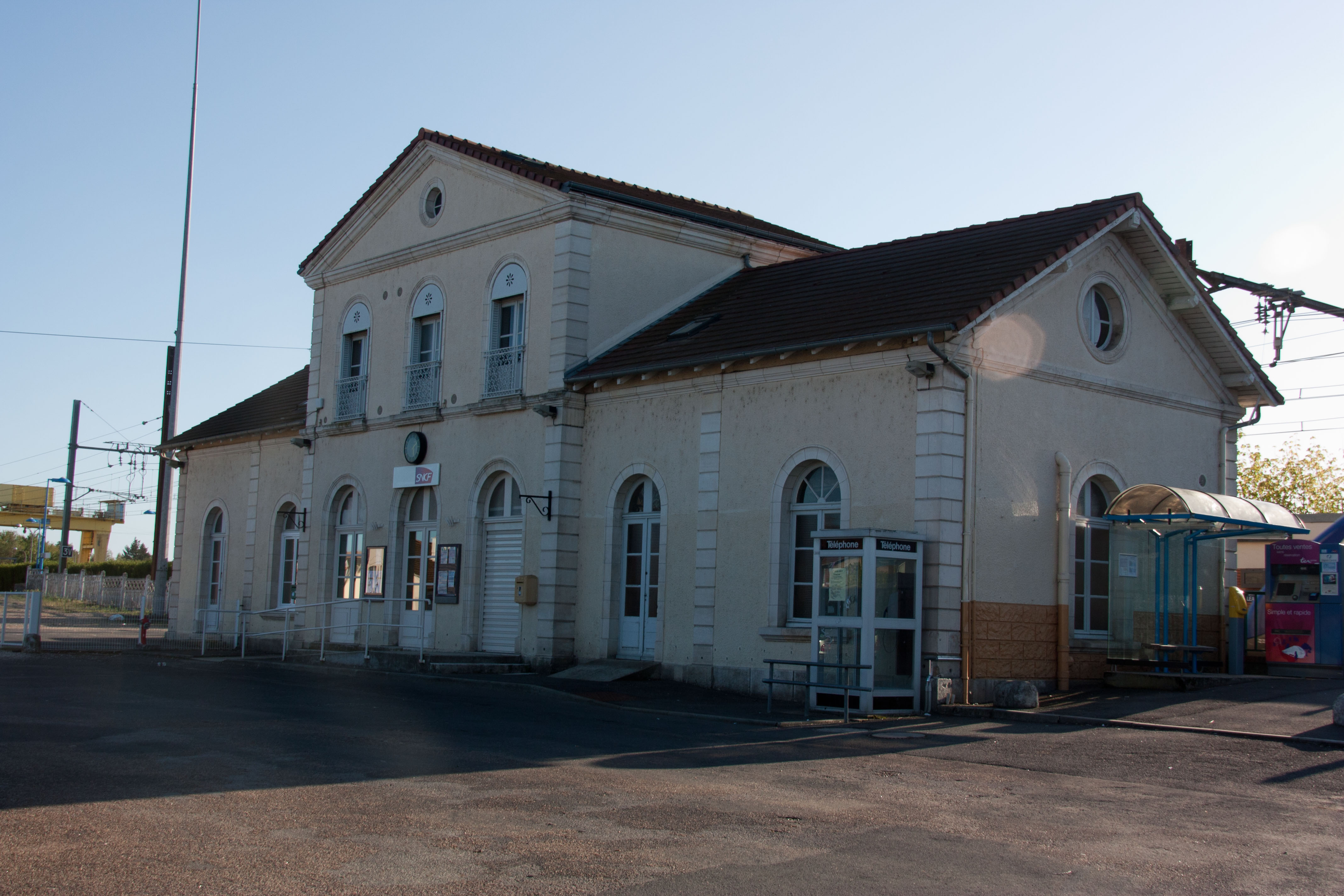 Gare de La Ferté-Saint-Aubin,La Ferté-Saint-Aubin, Loiret, France.